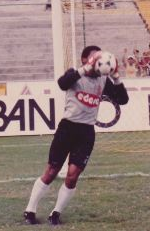 Víctor Ormaza jugando para Aucas en 1990